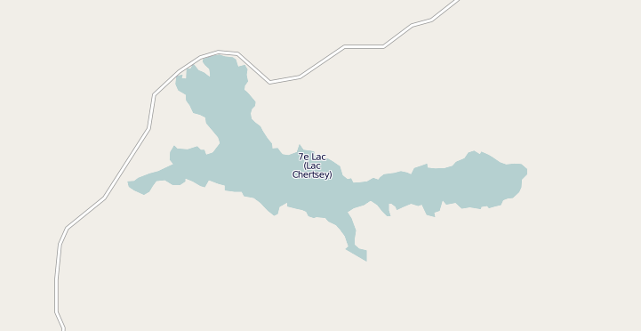 Carte du Septième Lac, Chertsey, Lanaudière, Québec